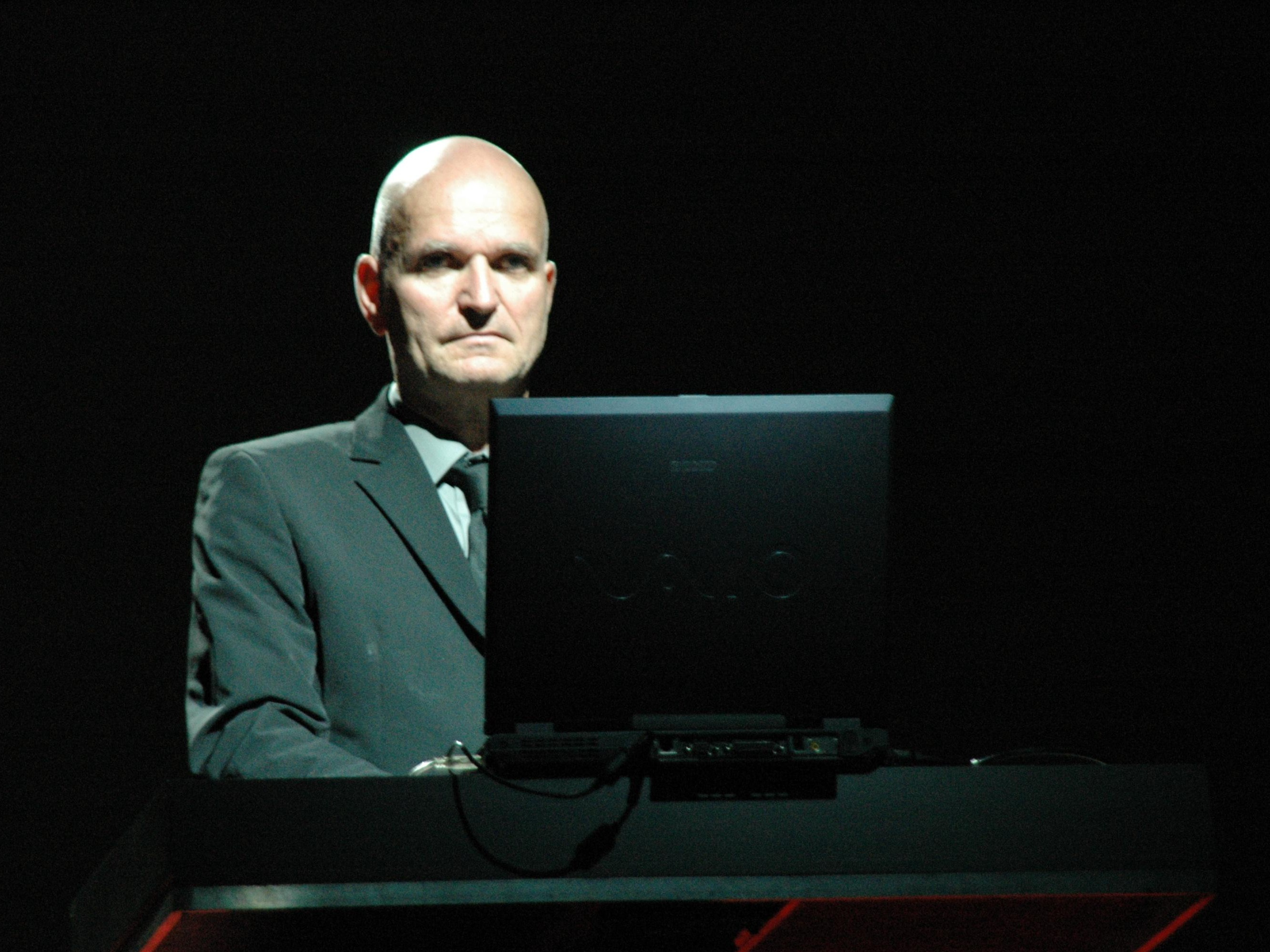 Florian Schneider (Kraftwerk), live in Ferrara (Italy), 06/07/2005